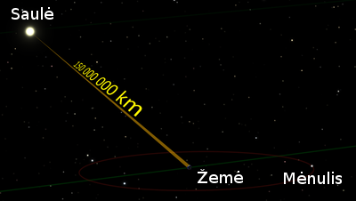 Iliustracija, kuri rodo Žemės atstumą iki Saulės. Išverstas paveikslėlis.